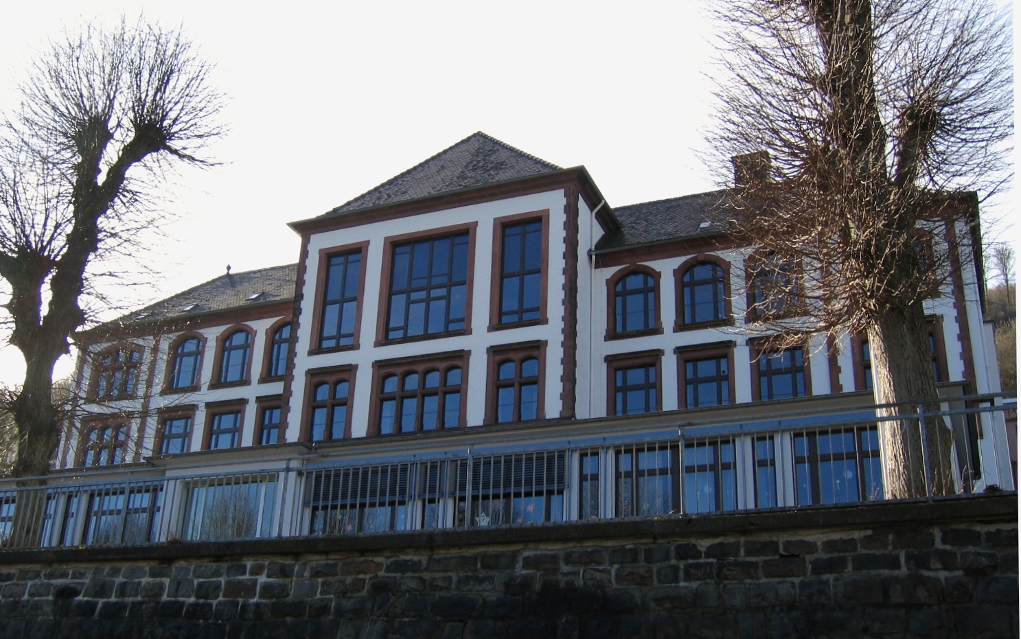 Burggymnasium in Altena.